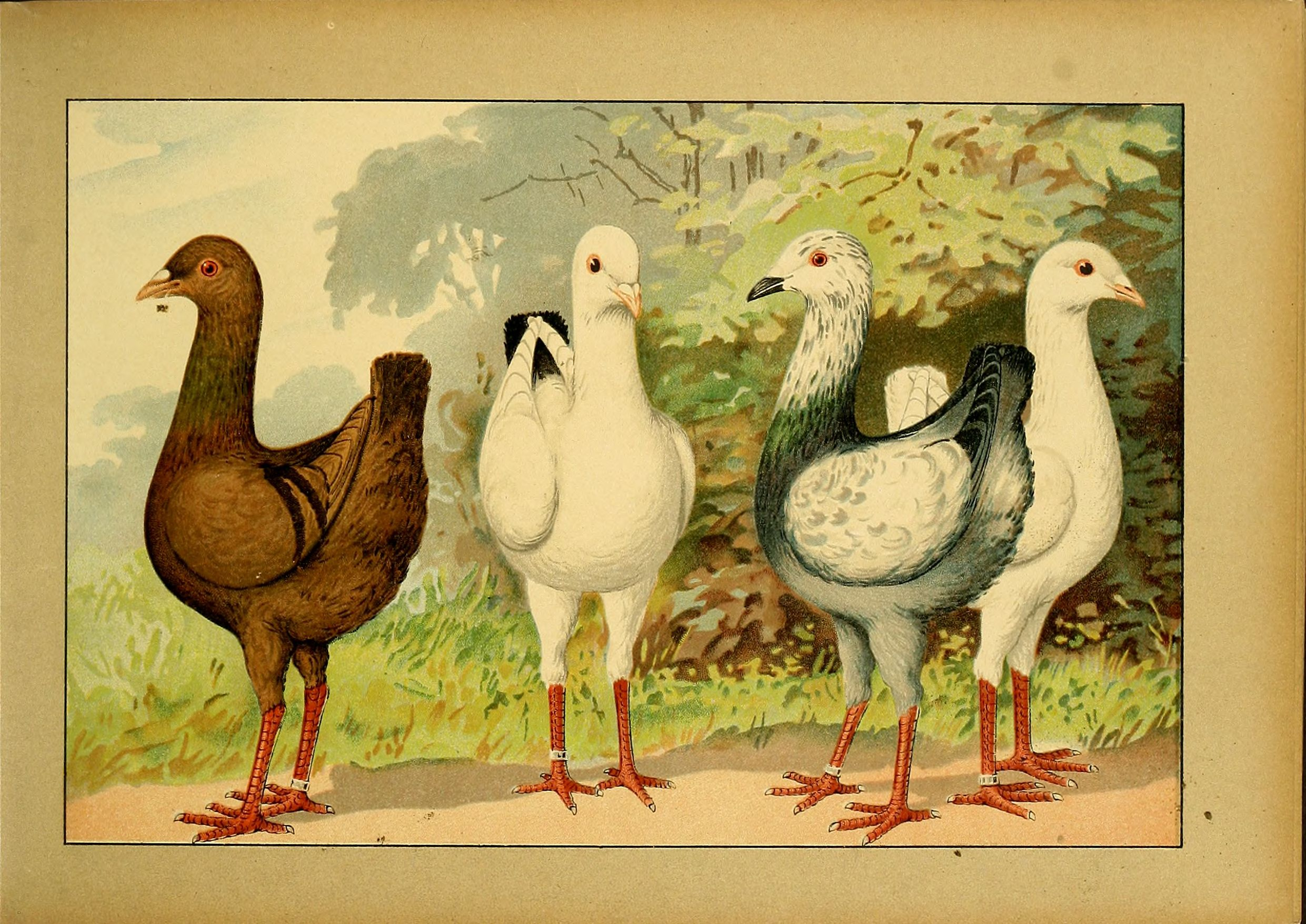 Deutsch